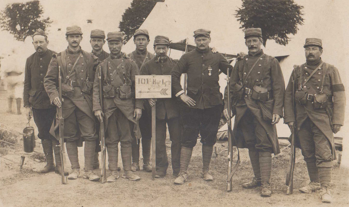 Militaires du 101e Régiment d'Infanterie en 1915